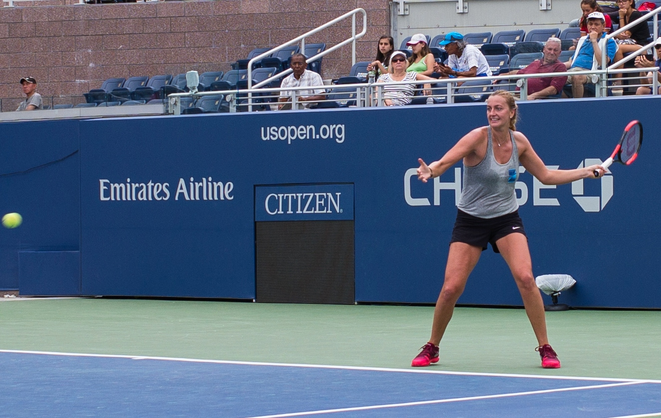 US Open 2017: Petra Kvitova's Practice